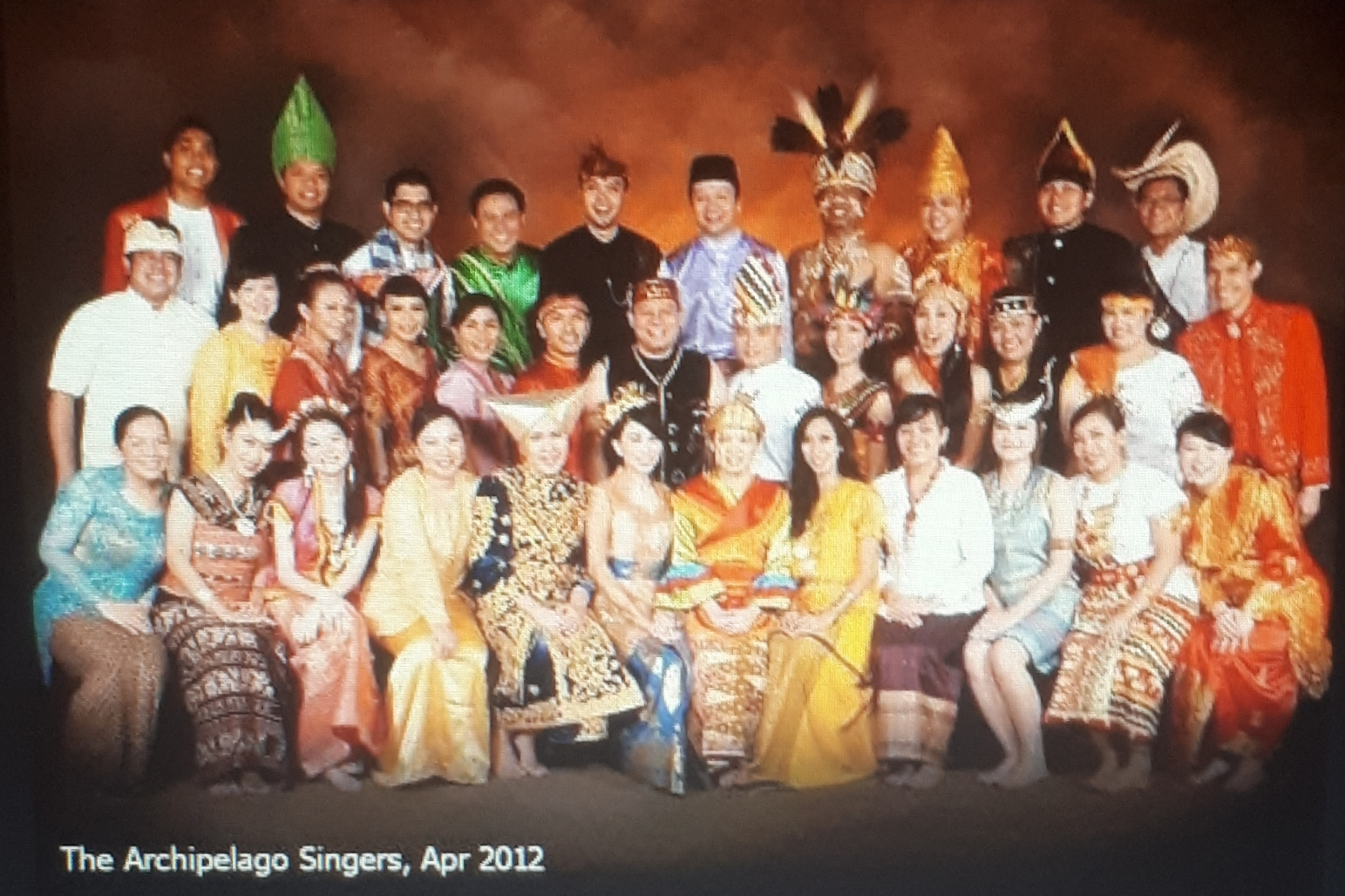 Bhinneka Tunggal Ika - Archipelago Singers